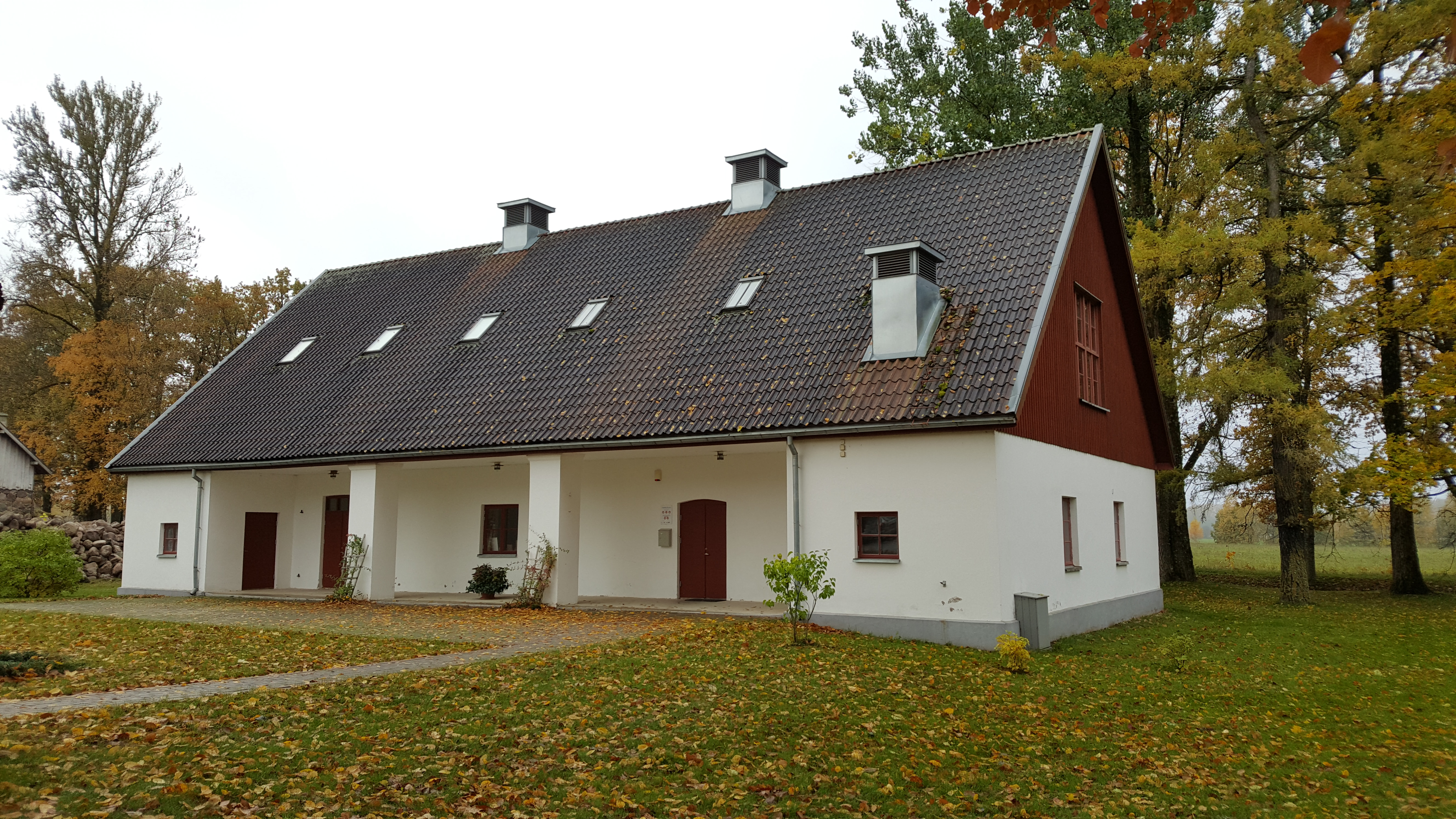 Skangali mõisa kõrvalhoone